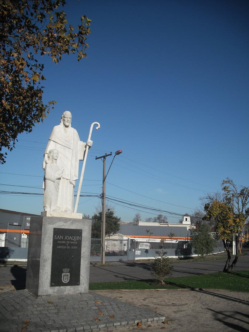 Patrono comunal de San Joaquín Estatua a la entrada norte de la comuna